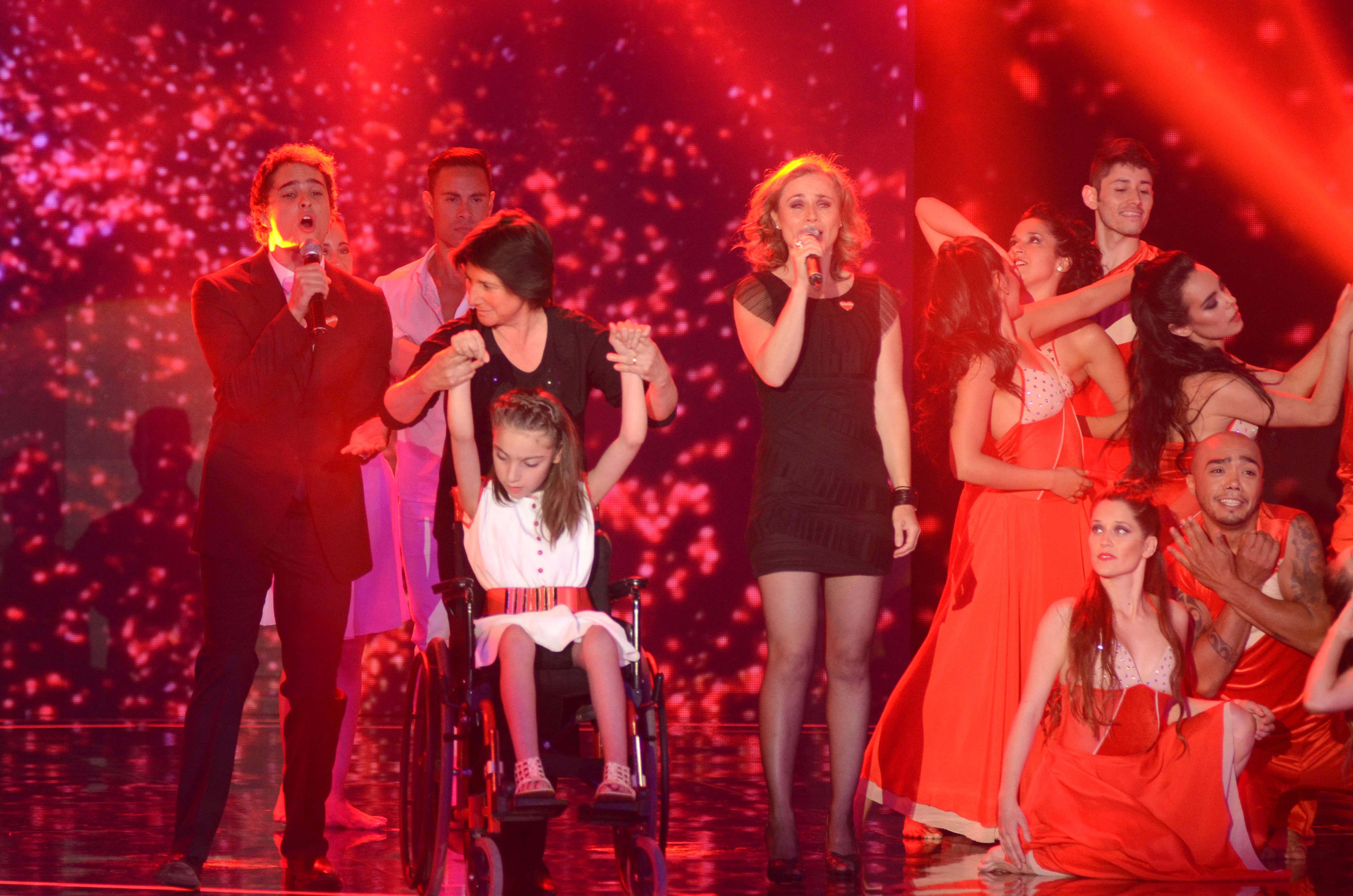 Ministro Elizalde asiste a la Ceremonia Inaugural de la Teletón